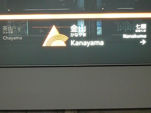 福岡市地下鉄七隈線金山駅の駅名標